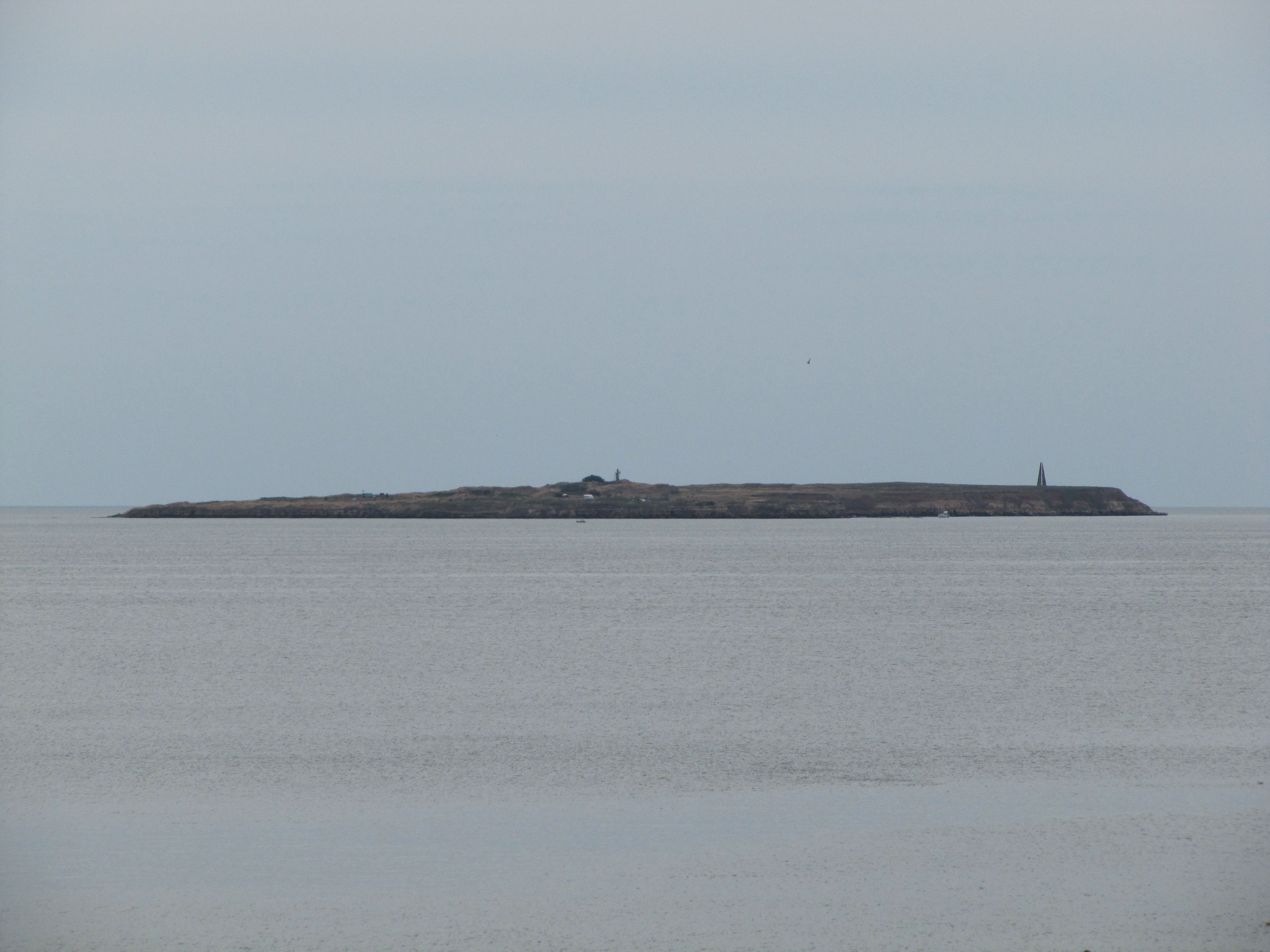 Березанський район, село Рибаківка, острів Березань (вид з узбережжя села Рибаківка) Миколаївська весна у Вікіпедії